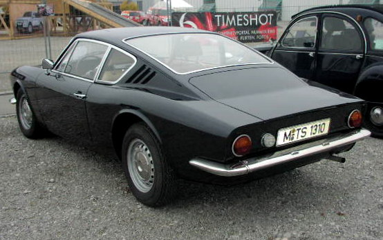 Ford OSI